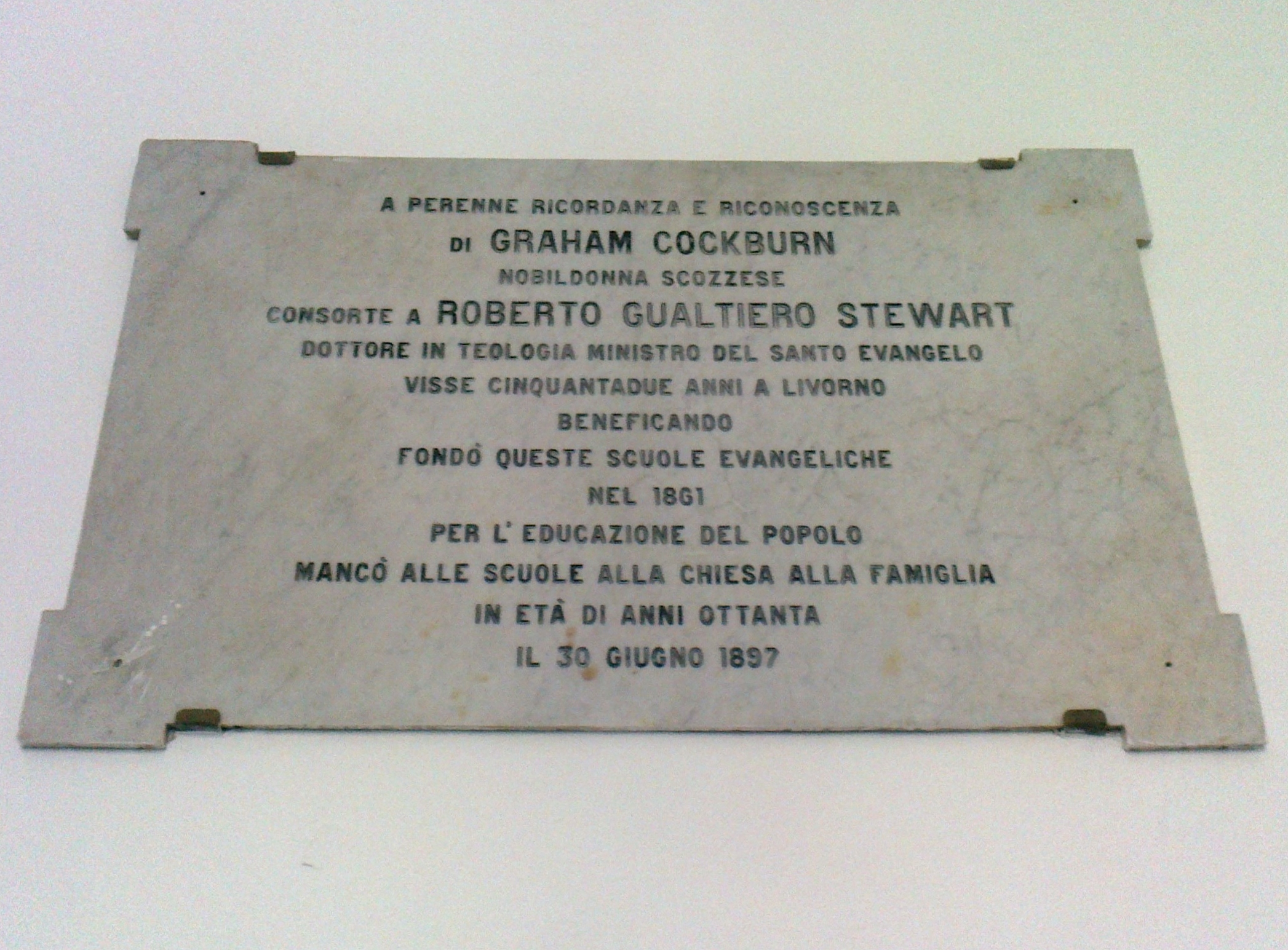 Livorno, chiesa valdese, già presbiteriana scozzese: un'epigrafe che ricorda il reverendo Stewart, della chiesa presbiteriana scozzese, e la moglie G. Cockburn.